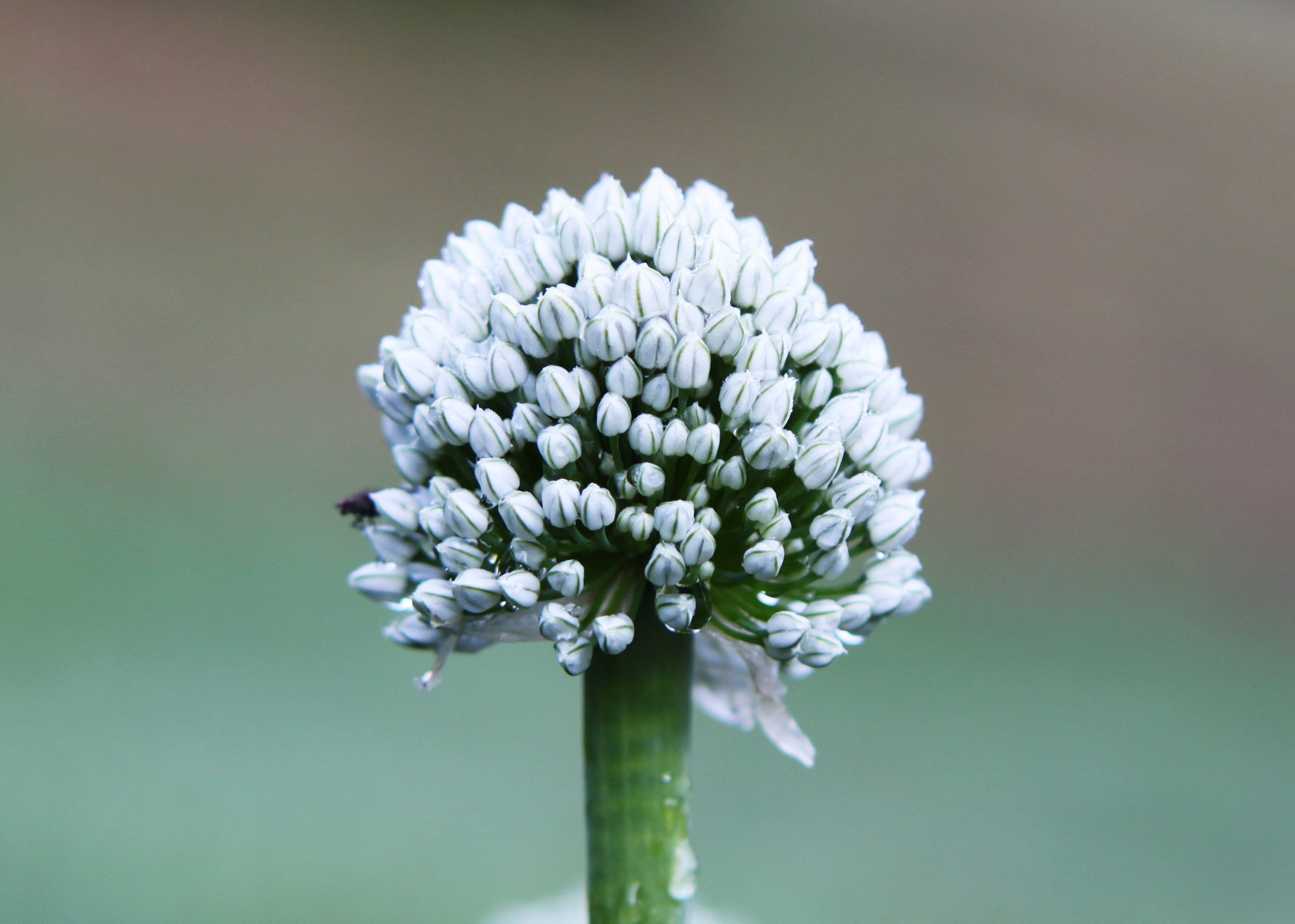 Květ cibule